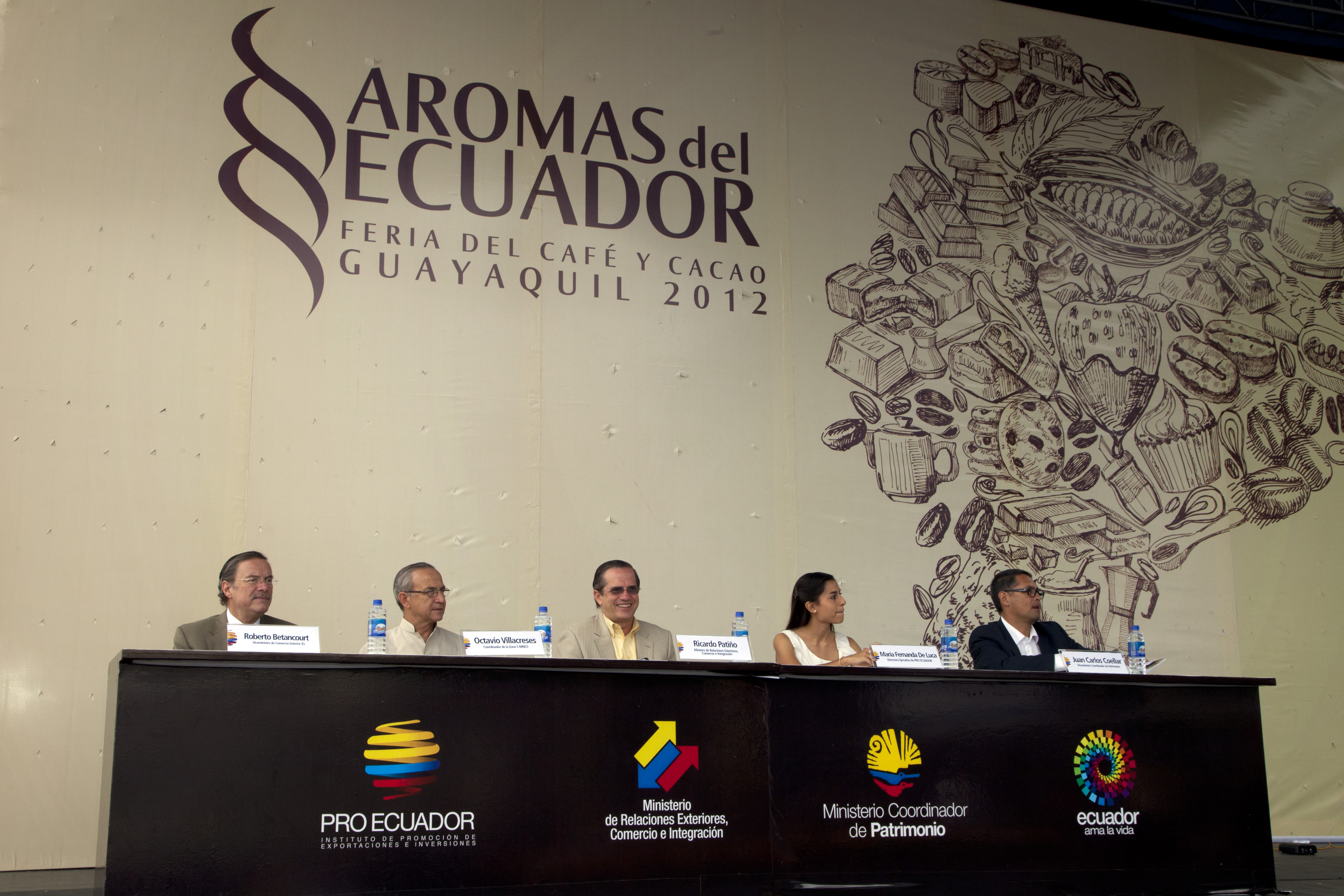 Guayaquil (Ecuador), 20 de septiembre 2012. La Segunda Edición de la feria "Aromas del Ecuador" estuvo presidida por: Roberto Betancourt, Viceministro de Comercio Exterior (E); Octavio Villacreses, Coordinador de la Zona 5 MRECI; el Canciller Ricardo Patiño; María Fernanda De Luca, Directora Ejecutiva de Pro Ecuador; Juan Carlos Coellar, Viceministro Coordinador de Patrimonio. Foto: Fernanda LeMarie - MRECI.